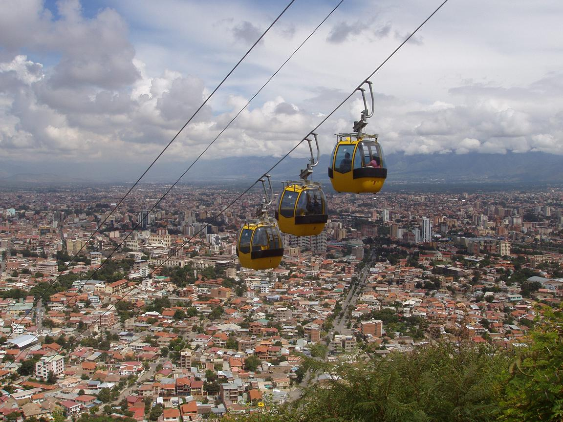 Panorámica de la ciudad de Cochabamba.